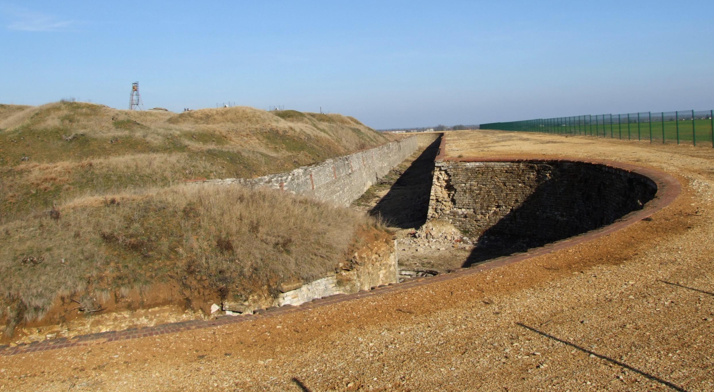 Fort de Beauregard, Fenay, Côte-d'Or, Bourgogne, FRANCE